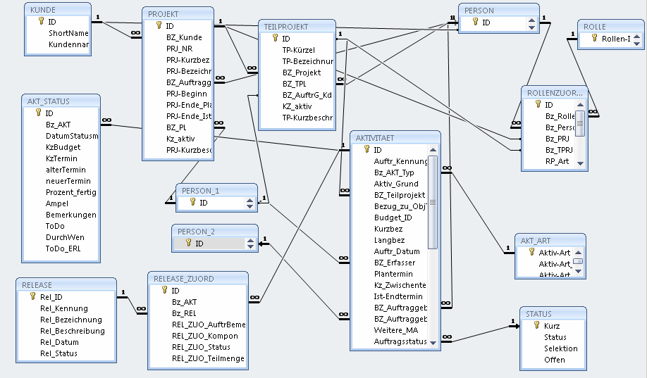 Datenbankschema (aus MS Access) für eine Auftragsverwaltung (im Projektmanagement)